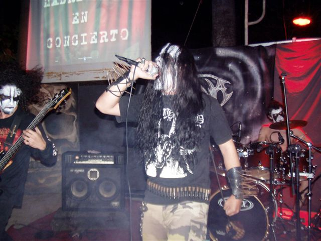 Ancestor durante la actuación ofrecida en el 6.6.6 Fest en La Habana, Cuba. 7 de febrero de 2010